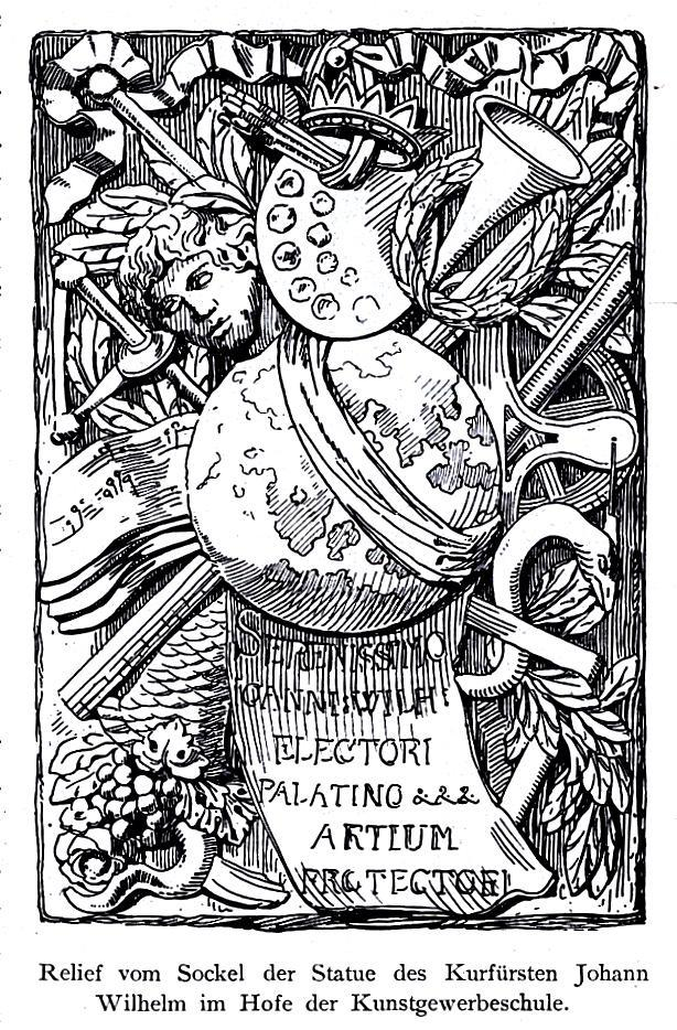 Relief des Sockels Jan-Wellem-Denkmal in Düsseldorf, erschaffen im Jahre 1780 vom Bildhauer Josef Bäumgen (* 1714 in Düsseldorf; † 1789), auch Johann Bäumchen und Johann Baumgärtgen